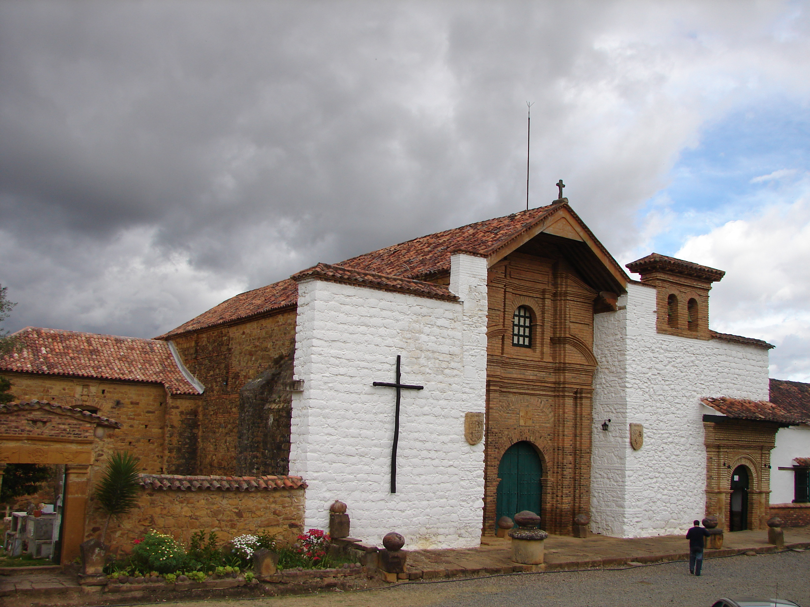 Vista frontal del monasterio del Ecce Homo, ubicado en Villa de Leyva, Colombia.